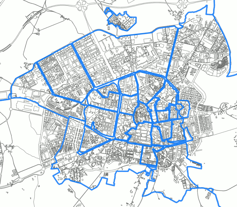 Gasteizko auzoen mapa 2007